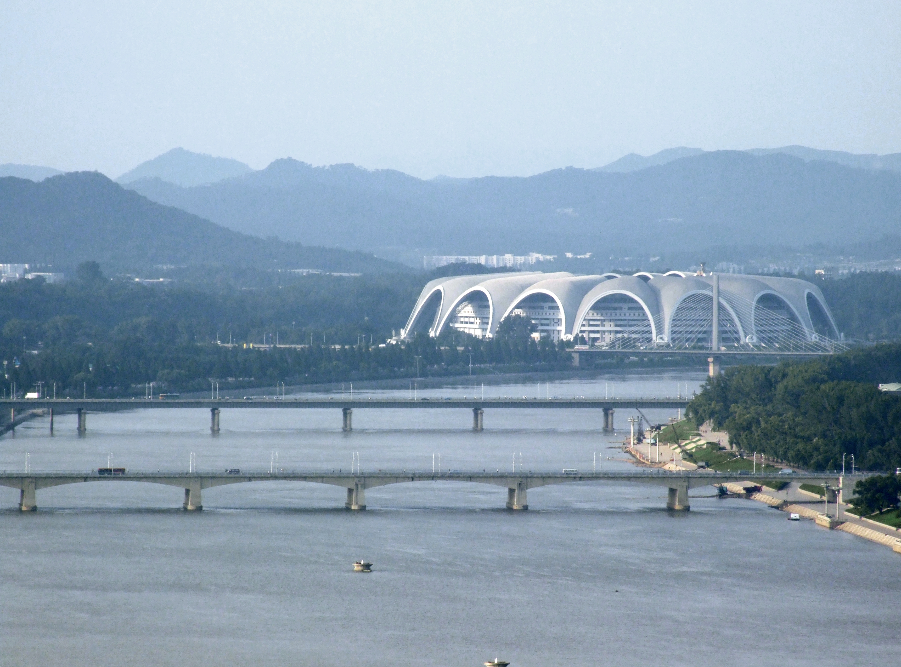 View from Yanggakdo International Hotel